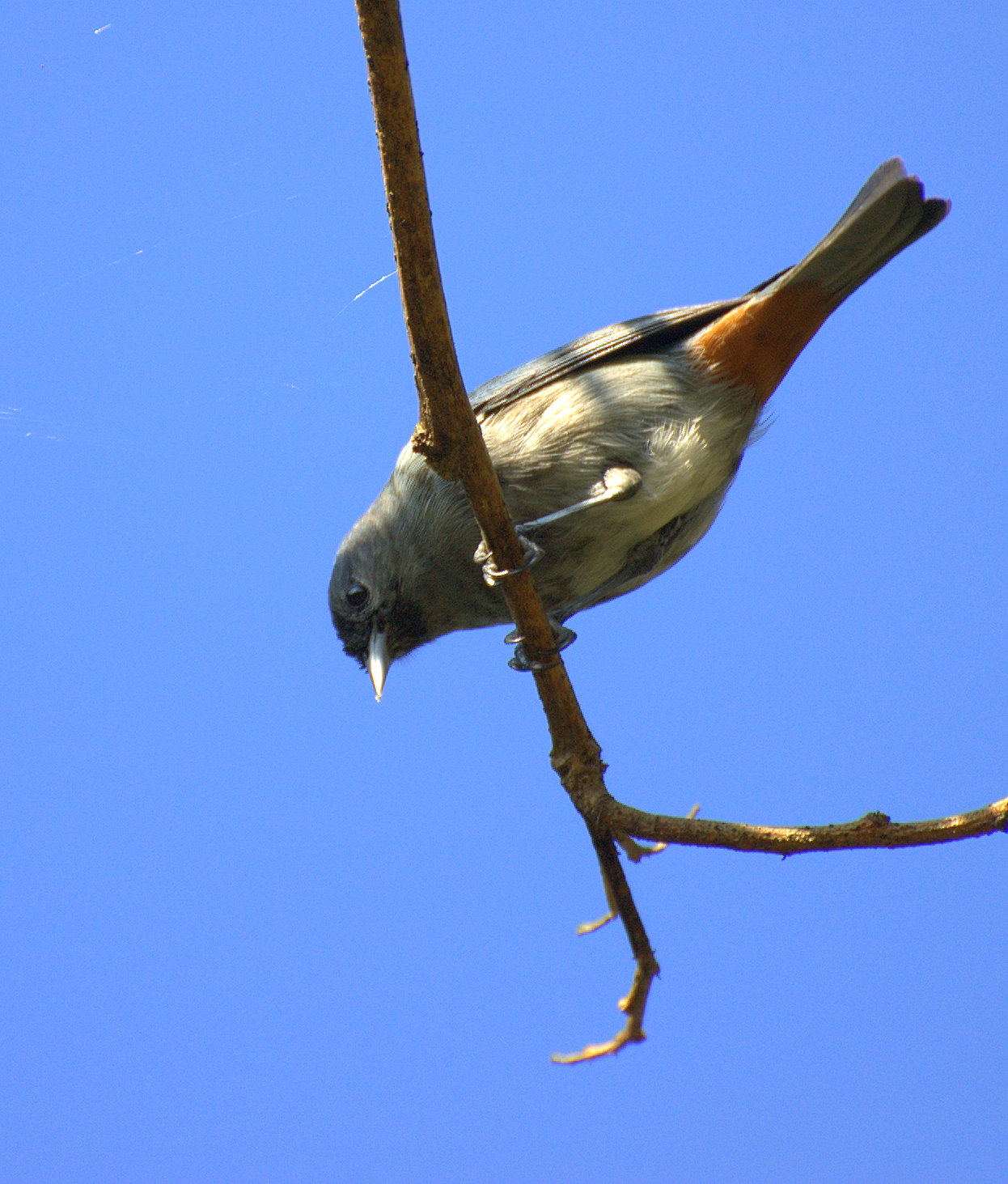 Chestnut-vented Conebill (Conirostrum speciosum) Horto Florestal de São Paulo